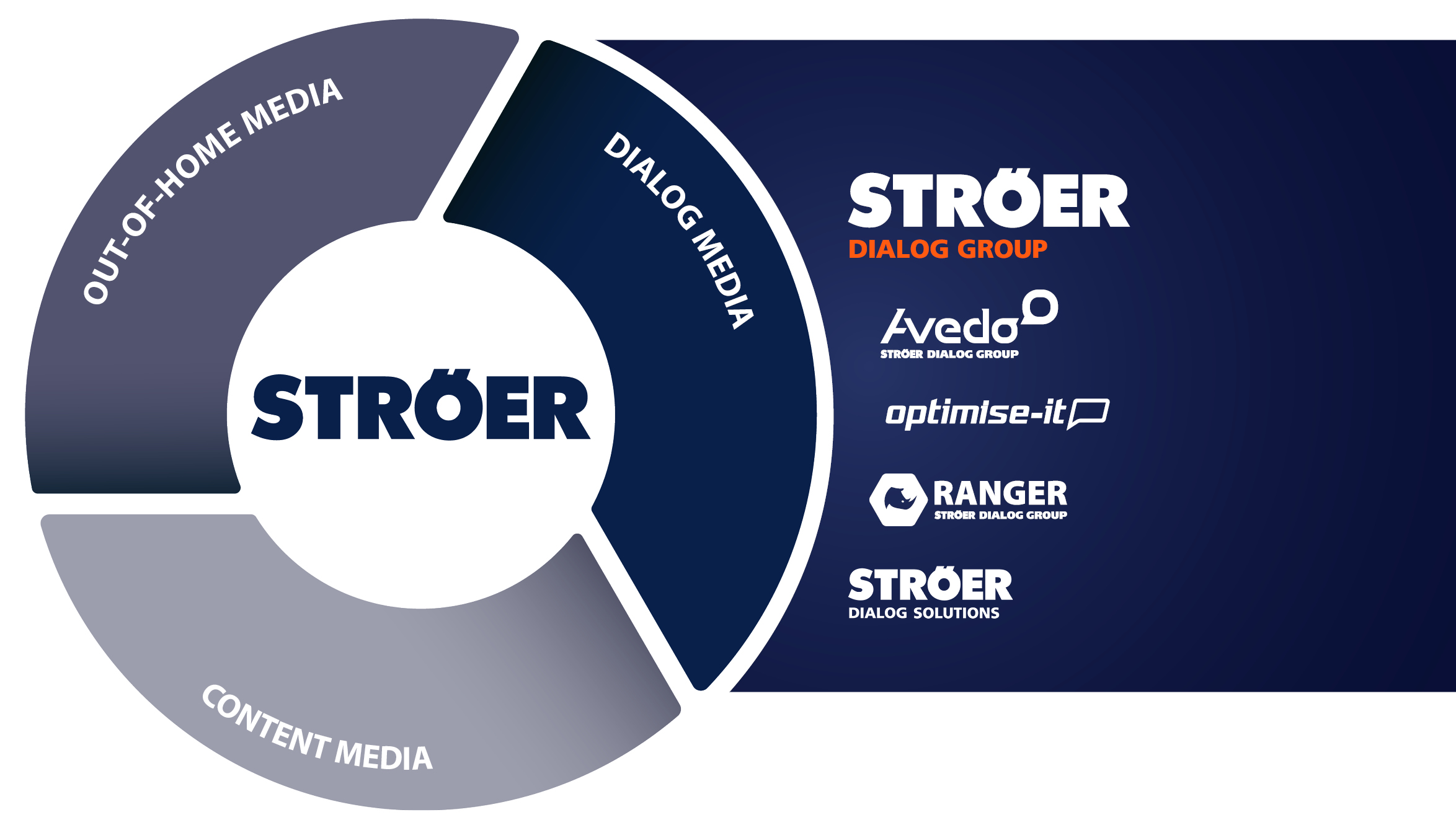 Einordnung der Ströer Dialog Group in den Konzern Ströer SE & Co. KGaA.